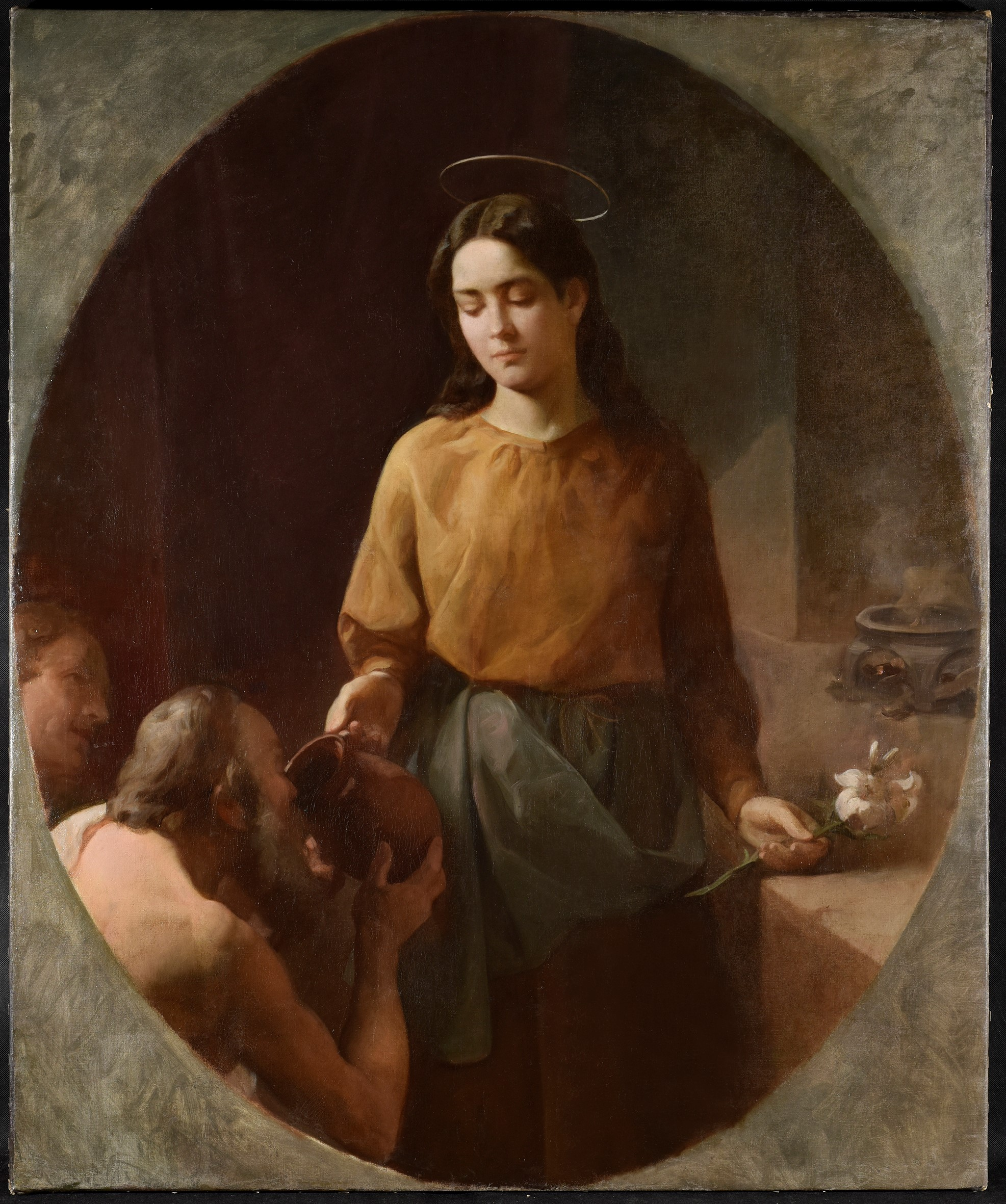 Święta Zyta (obraz po konserwacji w Akademii Sztuk Pięknych)